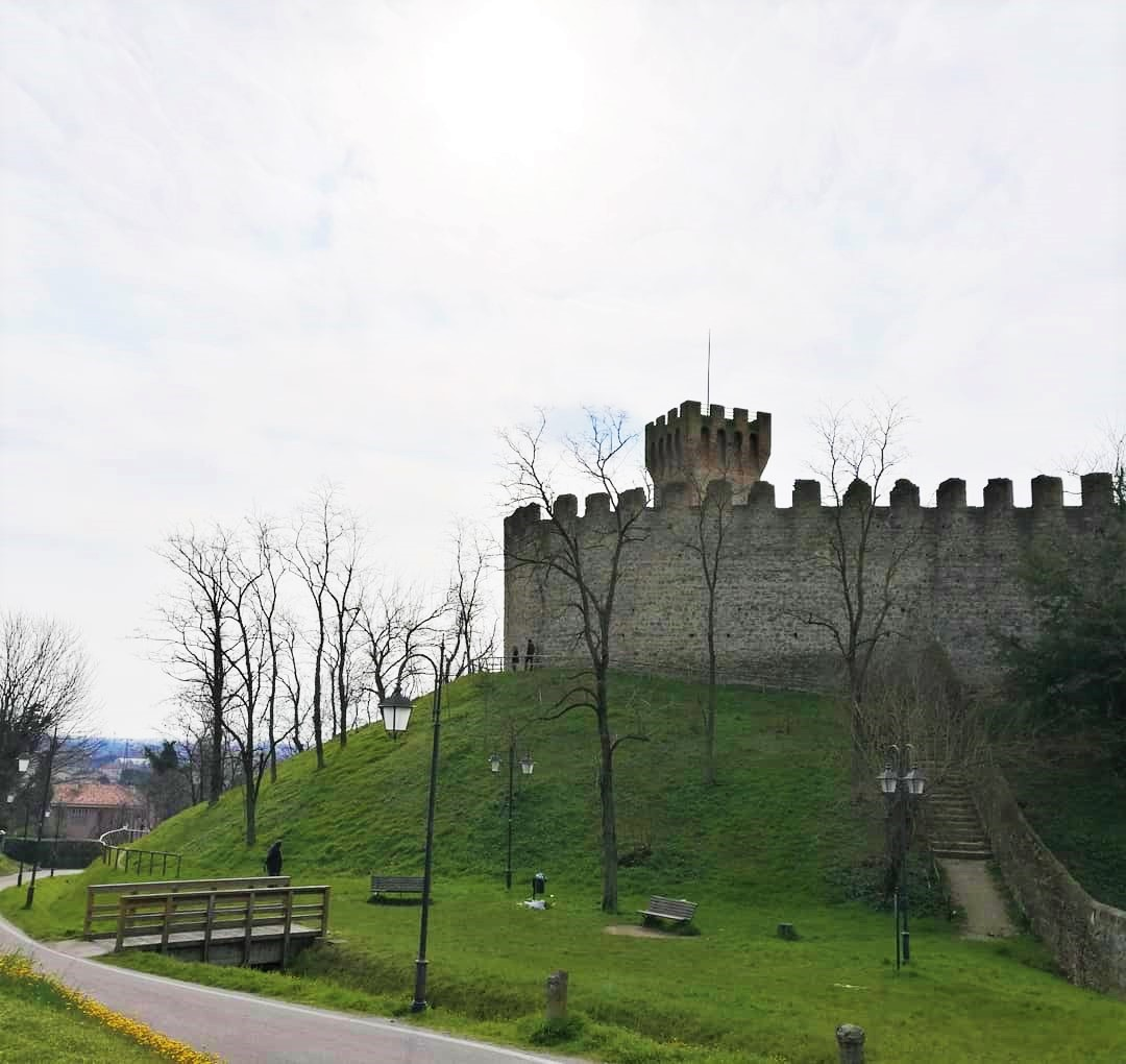 castello dei Carraresi This is a photo of a monument which is part of cultural heritage of Italy.